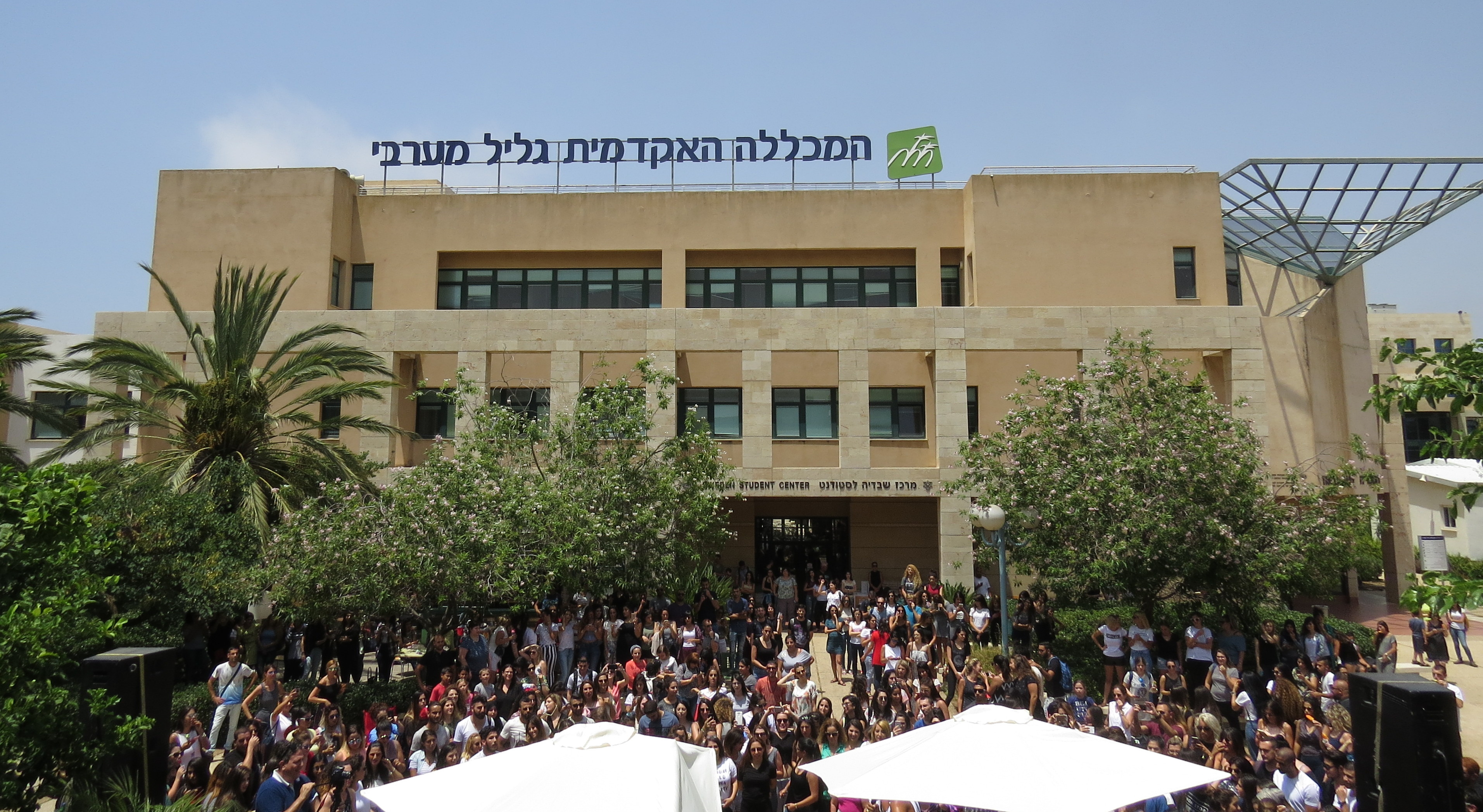 בית הסטודנט במכללה האקדמית גליל מערבי